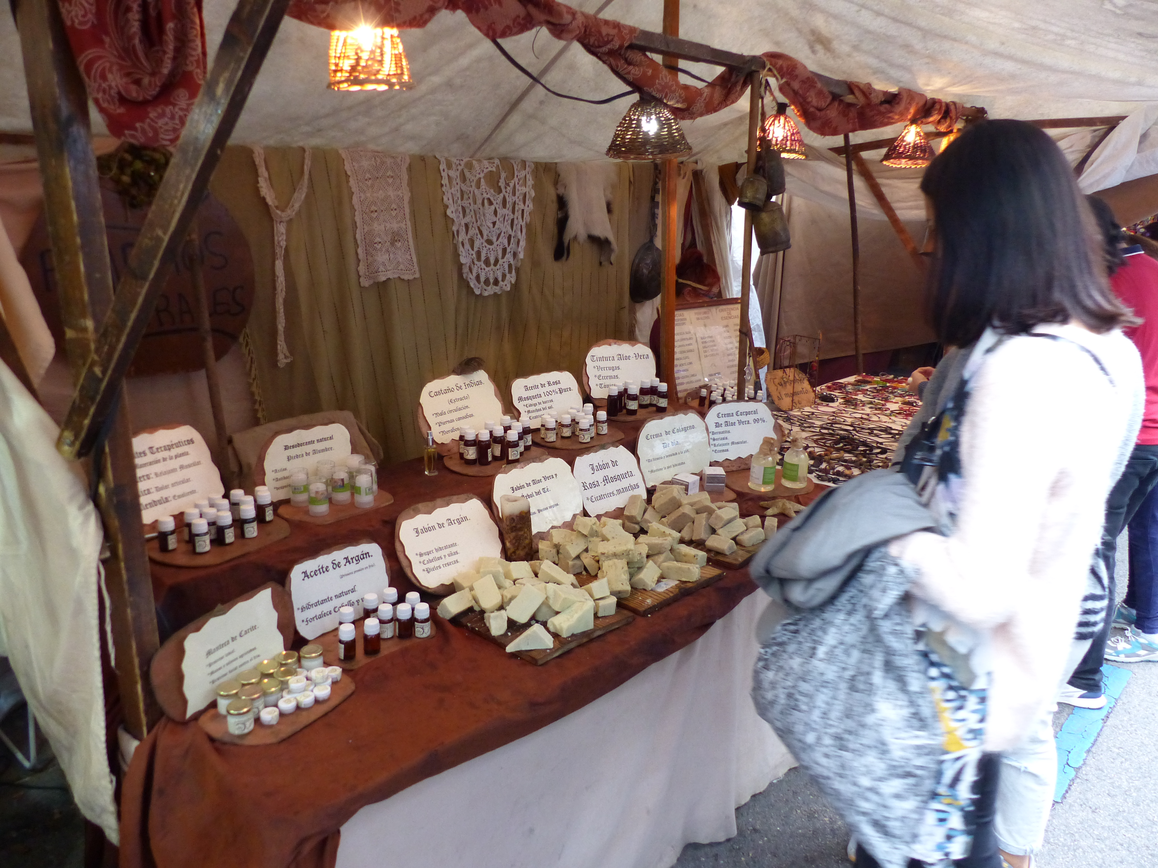 Puesto de jabones, mercadillo, Alcalá de Henares.